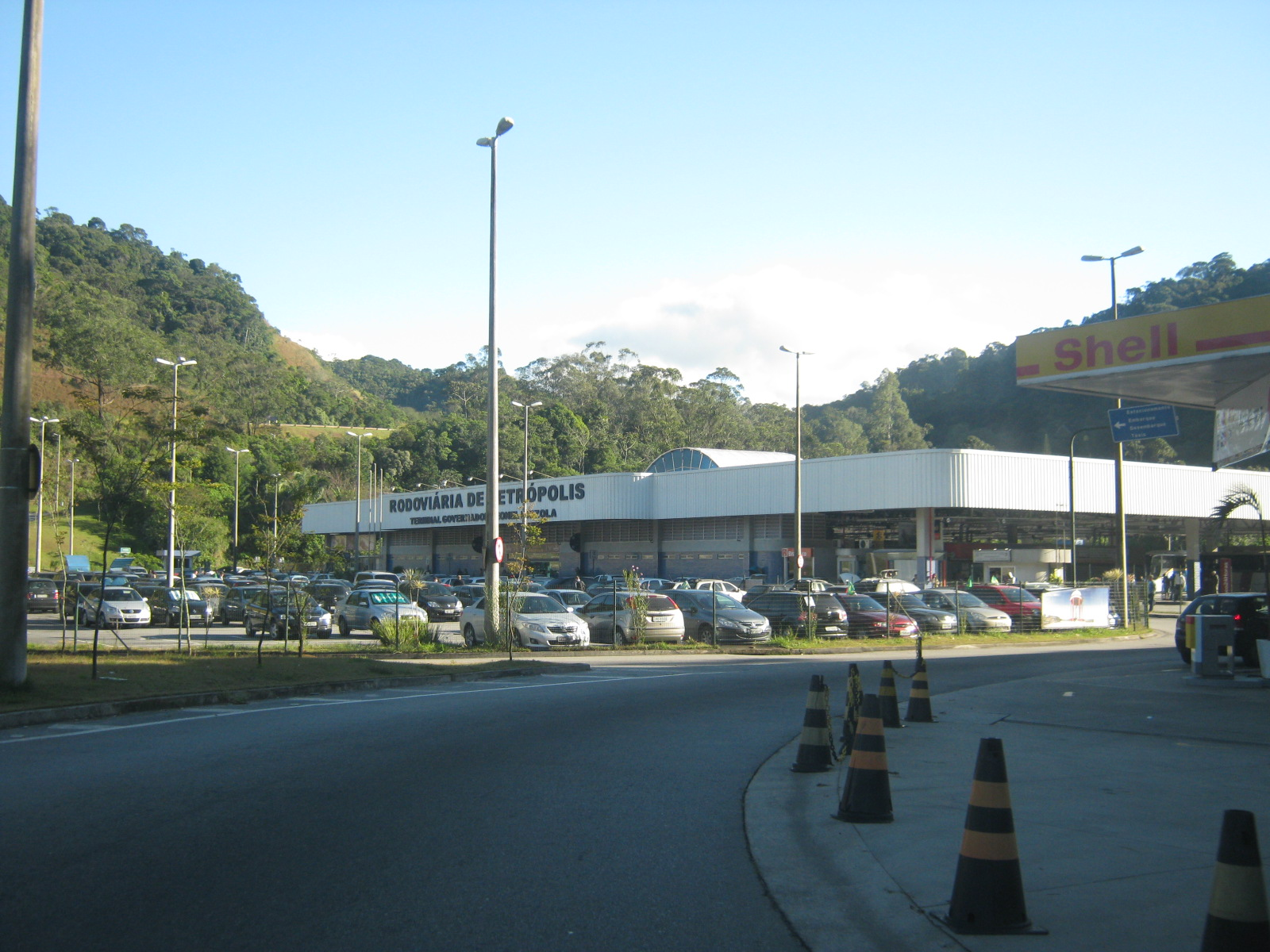 "Cidade Imperial": Petrópolis, RJ, Brasil.